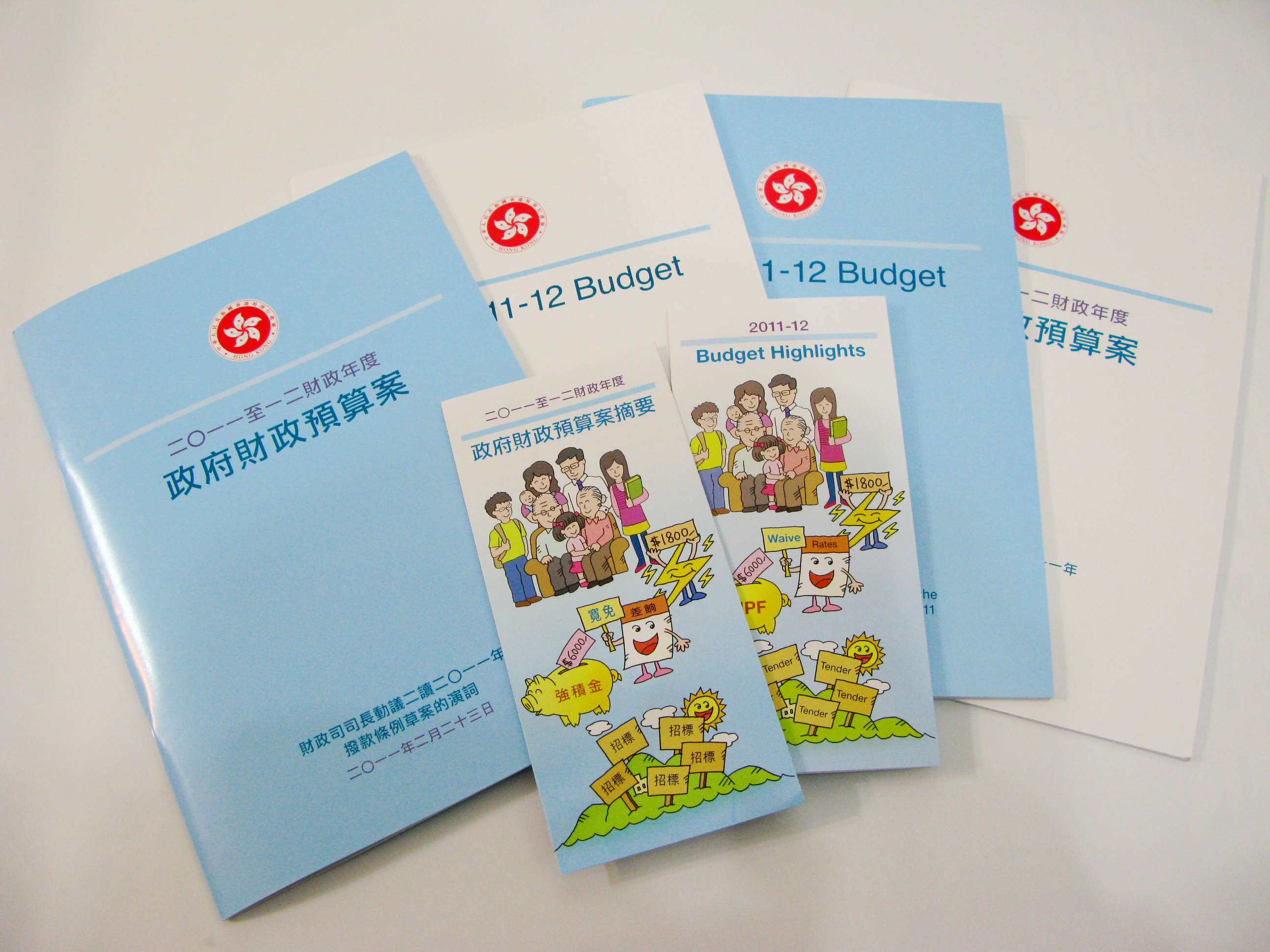 中文（香港）: 香港政府2011至2012年度財政預算案